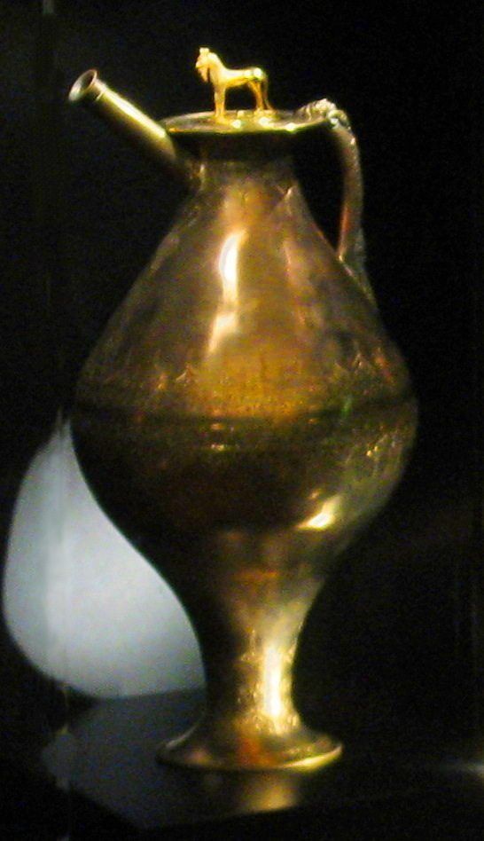 Fürstengrab